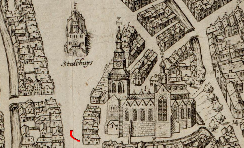 fragment van een kaart van Gouda uit de "Civitates Orbis Terrarum" door Braun & Hogenberg met pijl naar het huis hoek Wijdstraat/Achter de Kerk